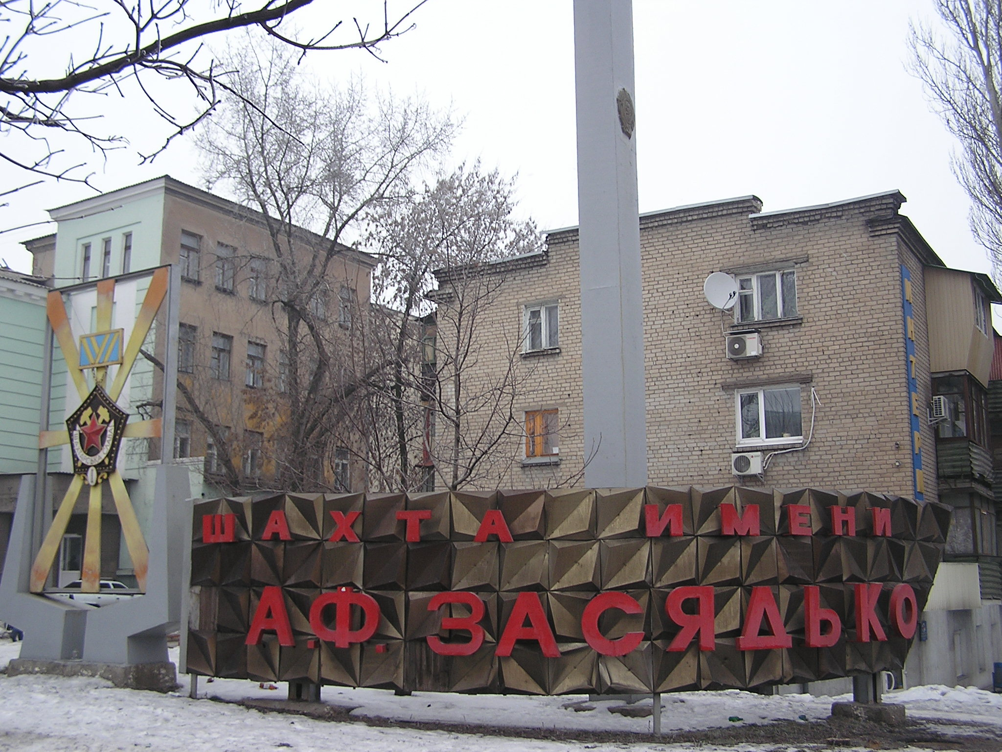 Донецк. Шахта Засядько.